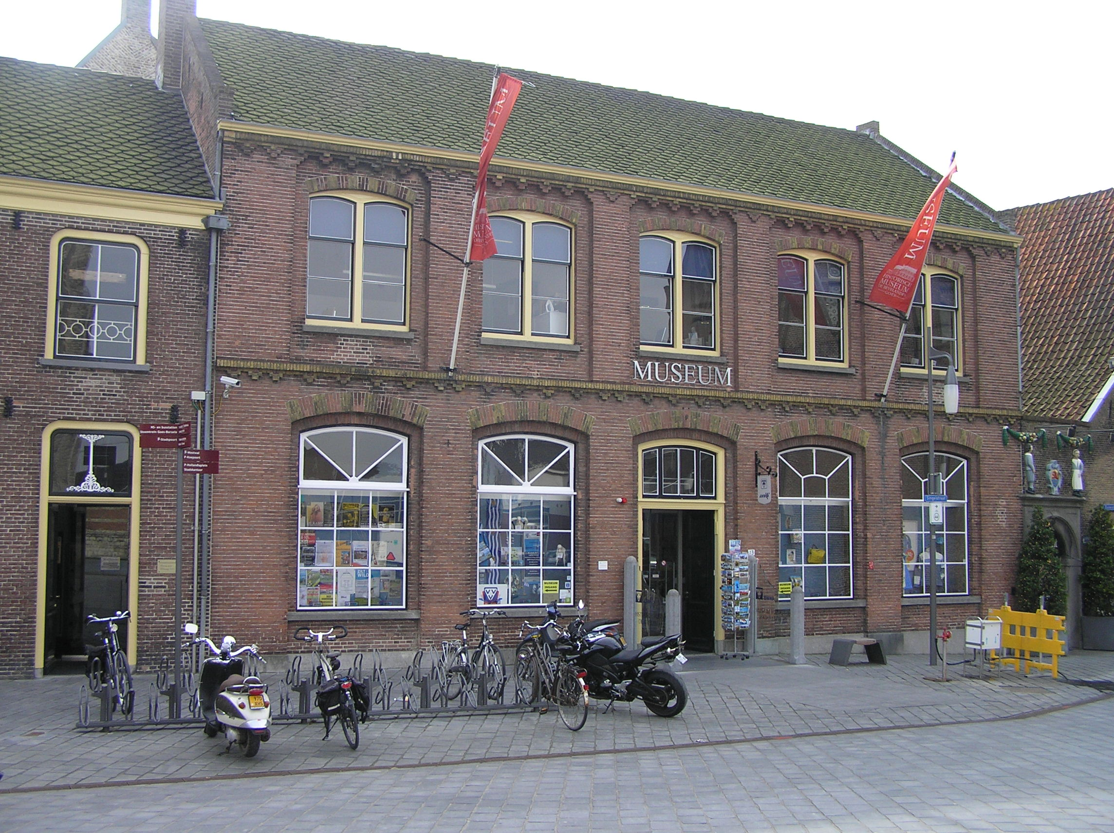 Historisch Museum De Bevelanden, Zusterstraat 13 (eigenlijk 11), Goes. Rijksmonument.